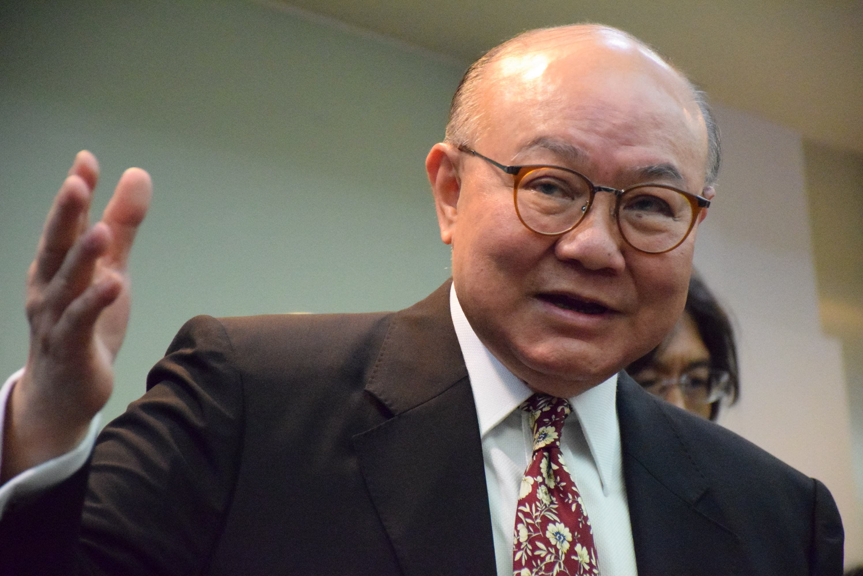 香港退休法官胡國興宣佈參加2017年特首選舉 (美國之音特約記者湯惠芸拍攝)